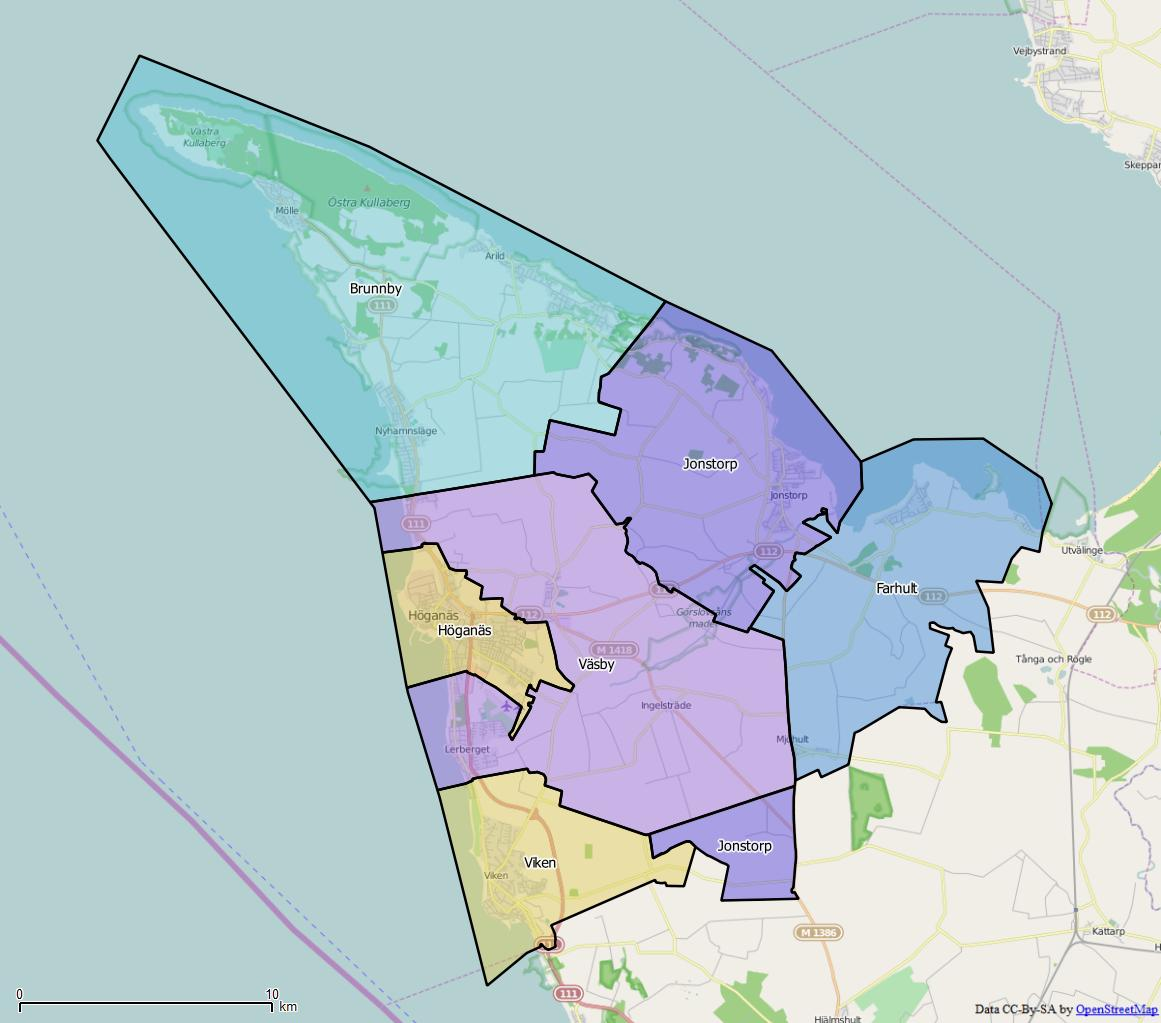 Distriktsindelningen i Höganäs kommun